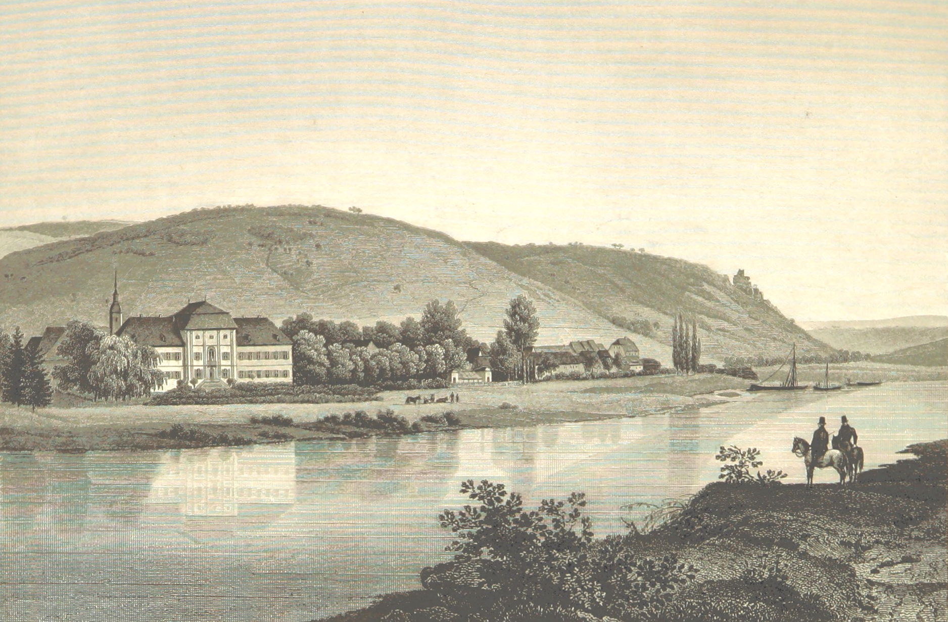 Feggenbach um 1845. Stahlstich nach Fritz Bamberger (1814-1873) aus dem Buch "Die Mainufer und ihre naechsten Umgebungen, mit 54 Stahlstichen, nach Originalzeichnungen von Fritz Bamberger nebst einer Stromkarte vom Main" von Ludwig Braunfels (Text). Erschienen in Würzburg bei Etlinger in Lieferungen von 1844 bis 1847.